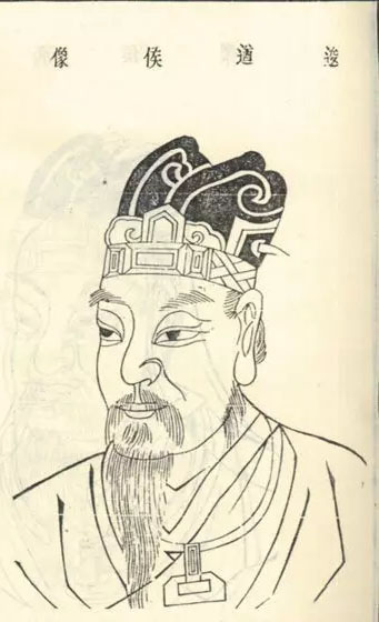 蔣橫畫像。